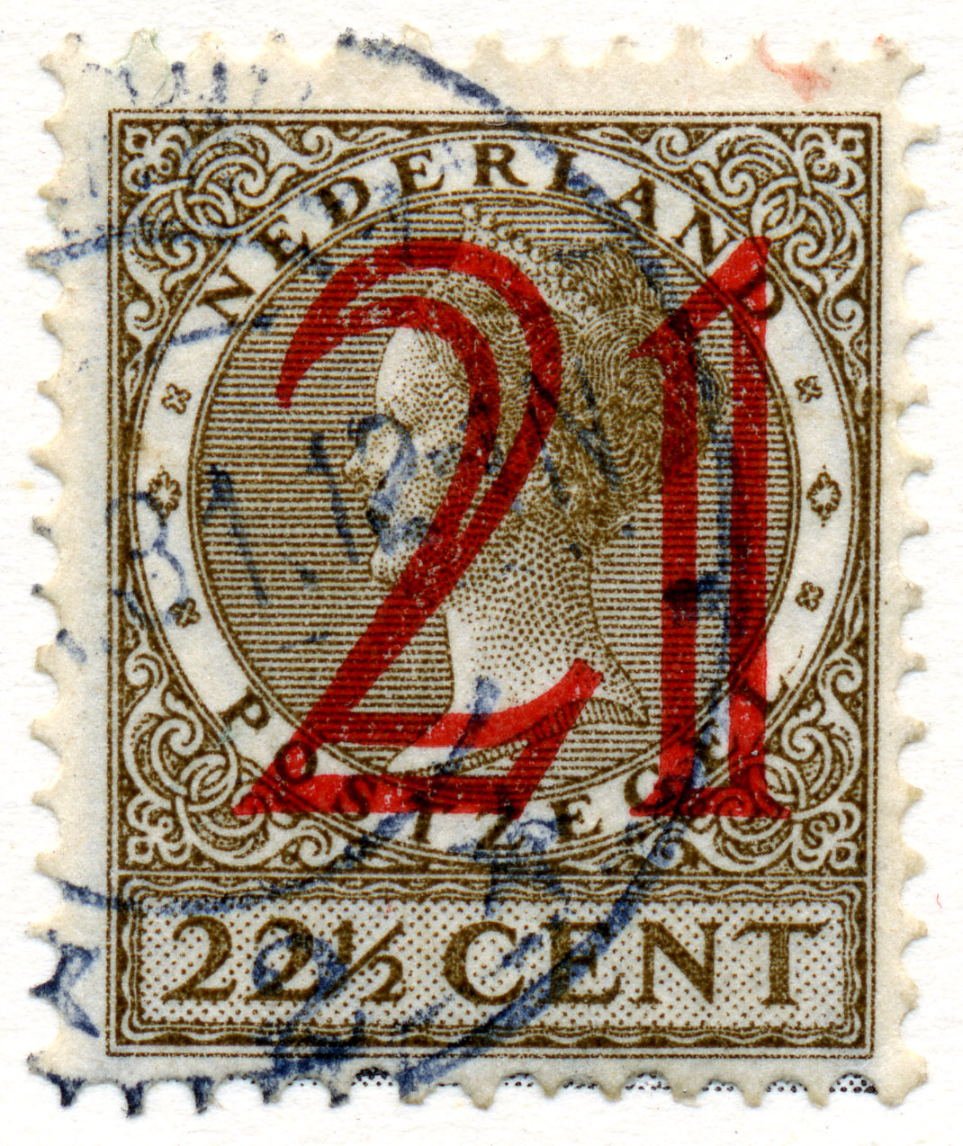 Hulpzegel 21 cent (1929) (NVPH nr 224). Ontwerper Jan van Krimpen